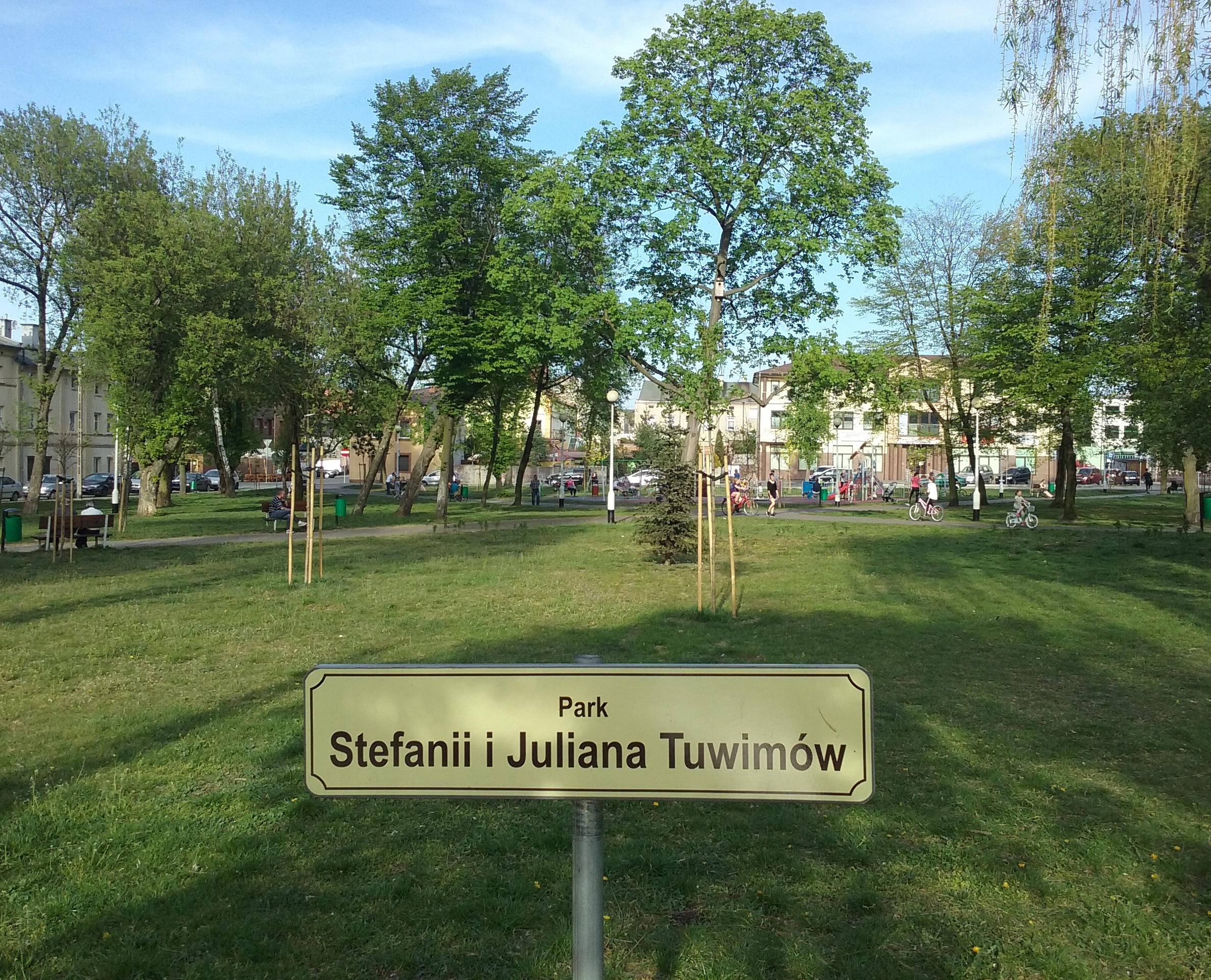 Tomaszów Mazowiecki w województwie łódzkim, PL, EU. Park im Stefanii i Juliana Tuwimów w Tomaszowie, CC0